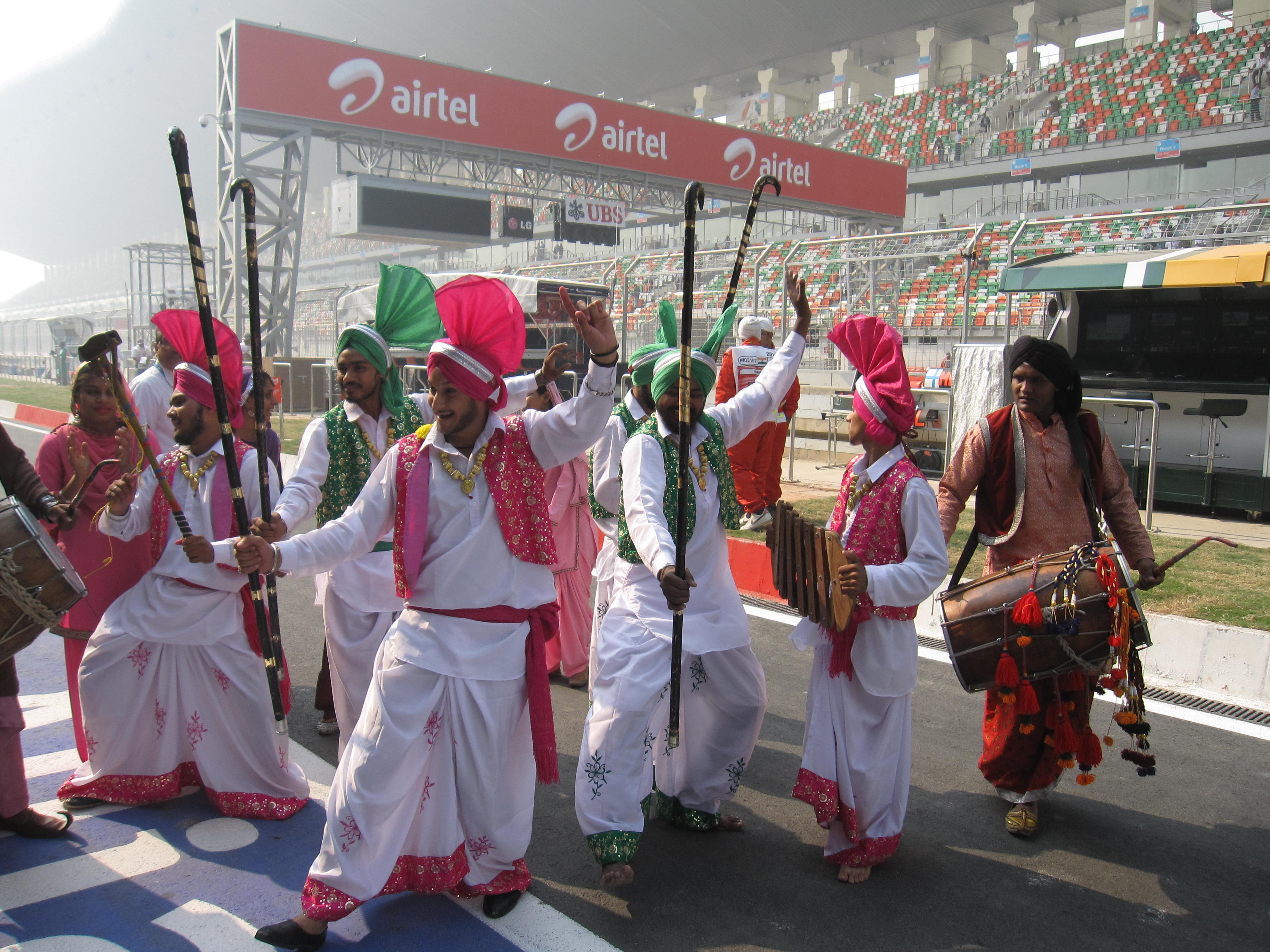 Tarian India di grid